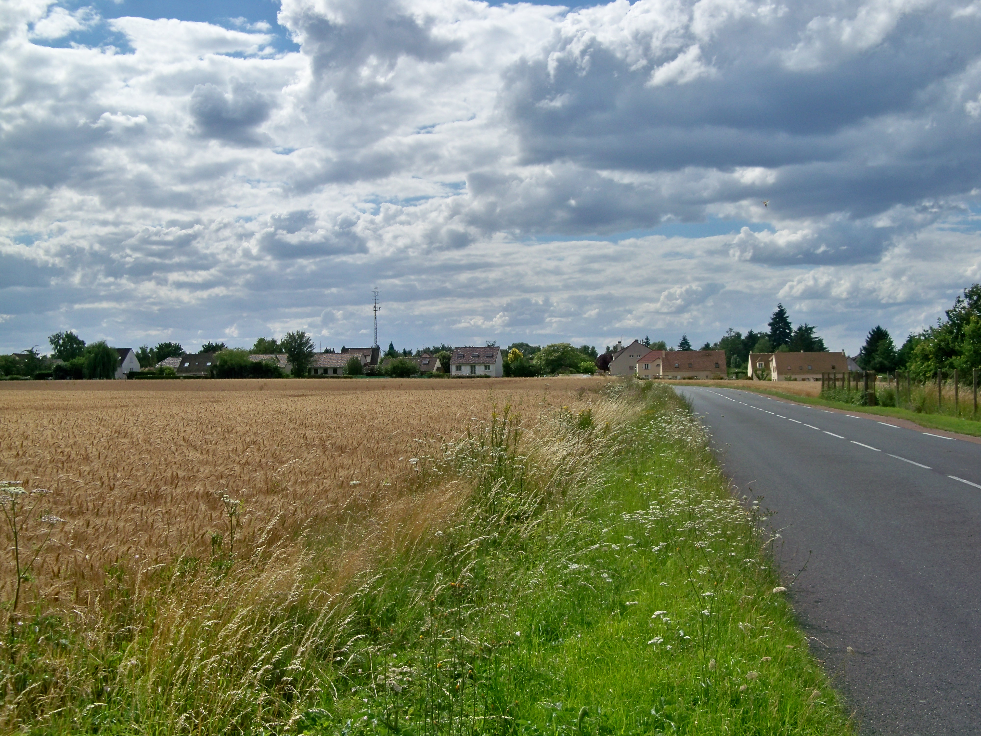 vue générale des champs du Hurepoix, près de Pecqueuse, Essonne, France